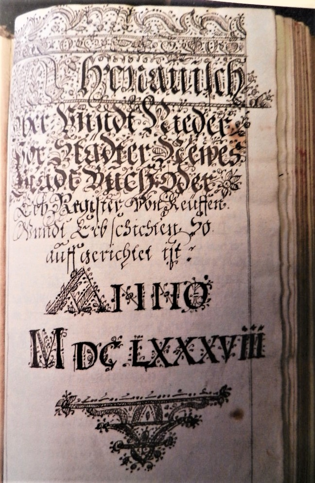 Die Missalschrift des 15. Jh. wurde in den spät angefangenen Stadtbuch von 1688 noch dargestellt